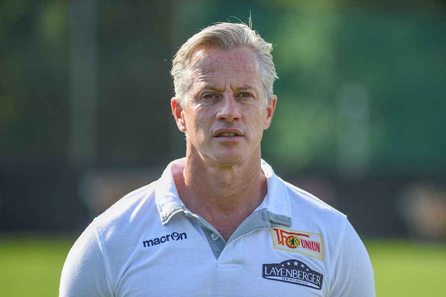 Jens Keller, Trainer des 1. FC Union Berlin (2016)